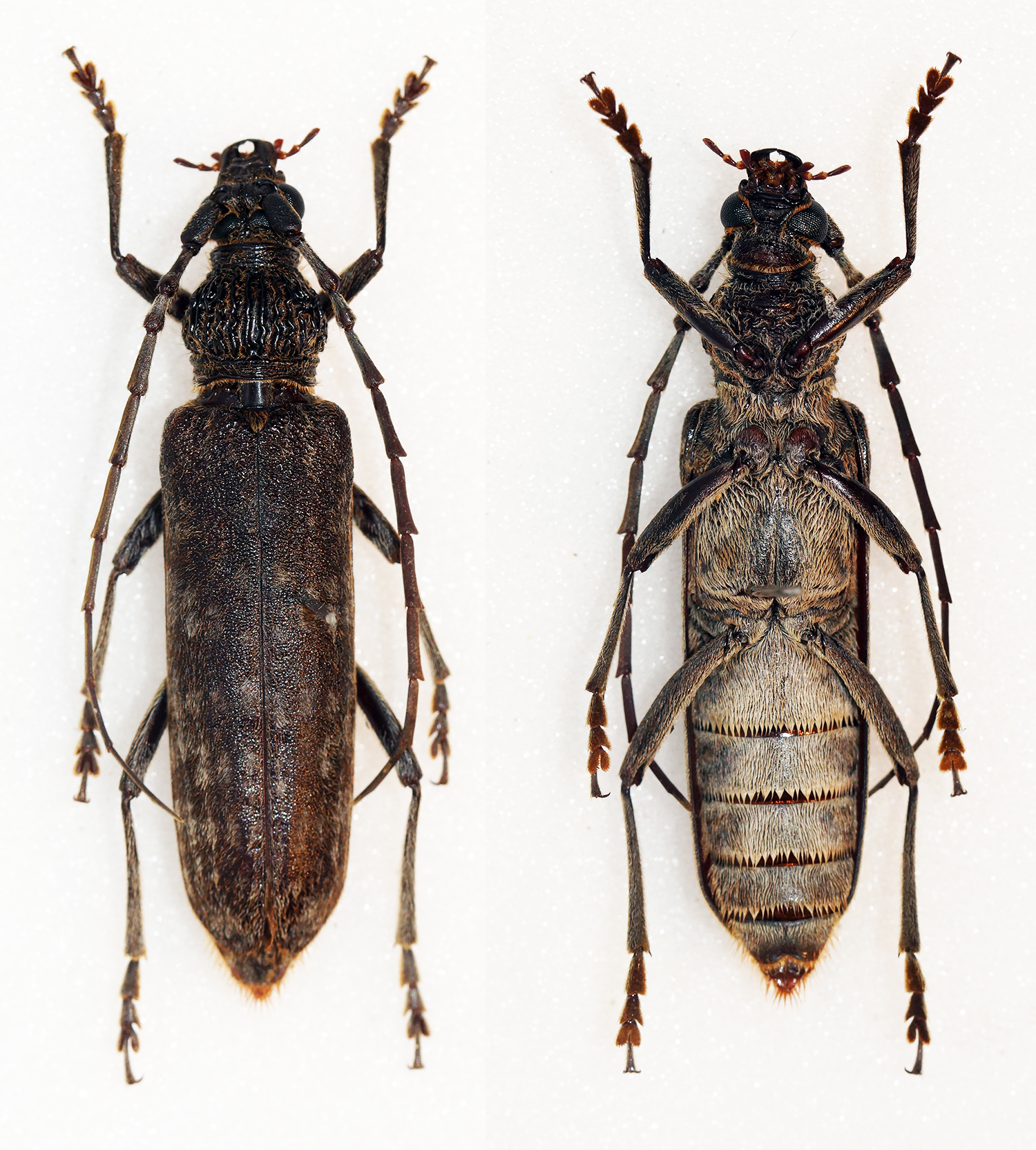 Pic,2012 Sex: Female Data: 25-04-14 - Mt Dayaoshan 1200m - Pingban - Jinxiu - Guangxi - China Size: 41mm